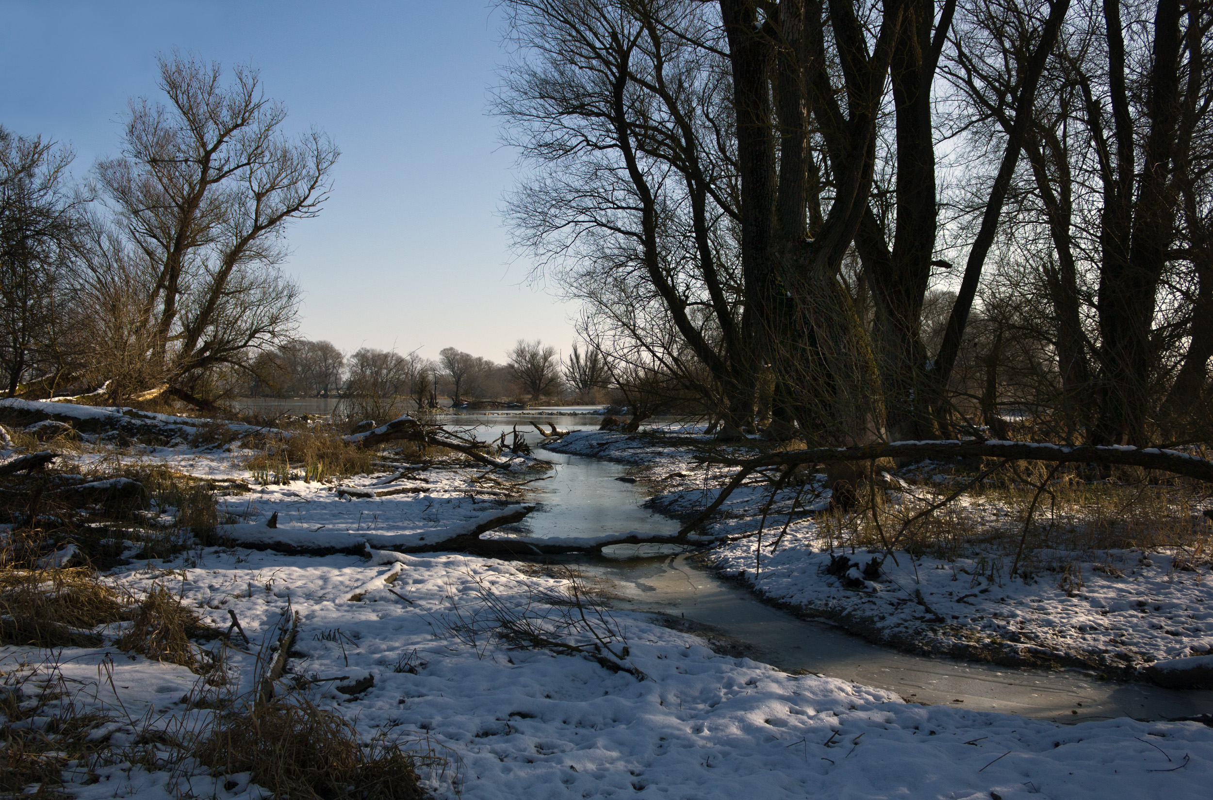 Naturschutzgebiet „Öberauer Schleife“ (NSG 00288.01), Bayern